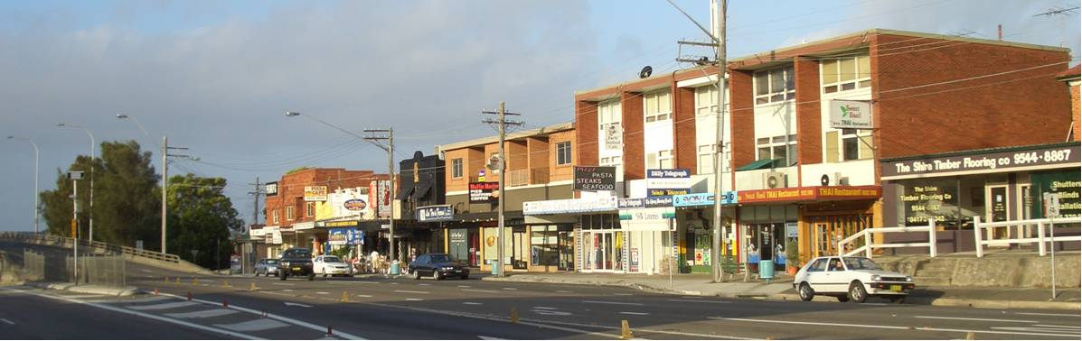 Sylvania